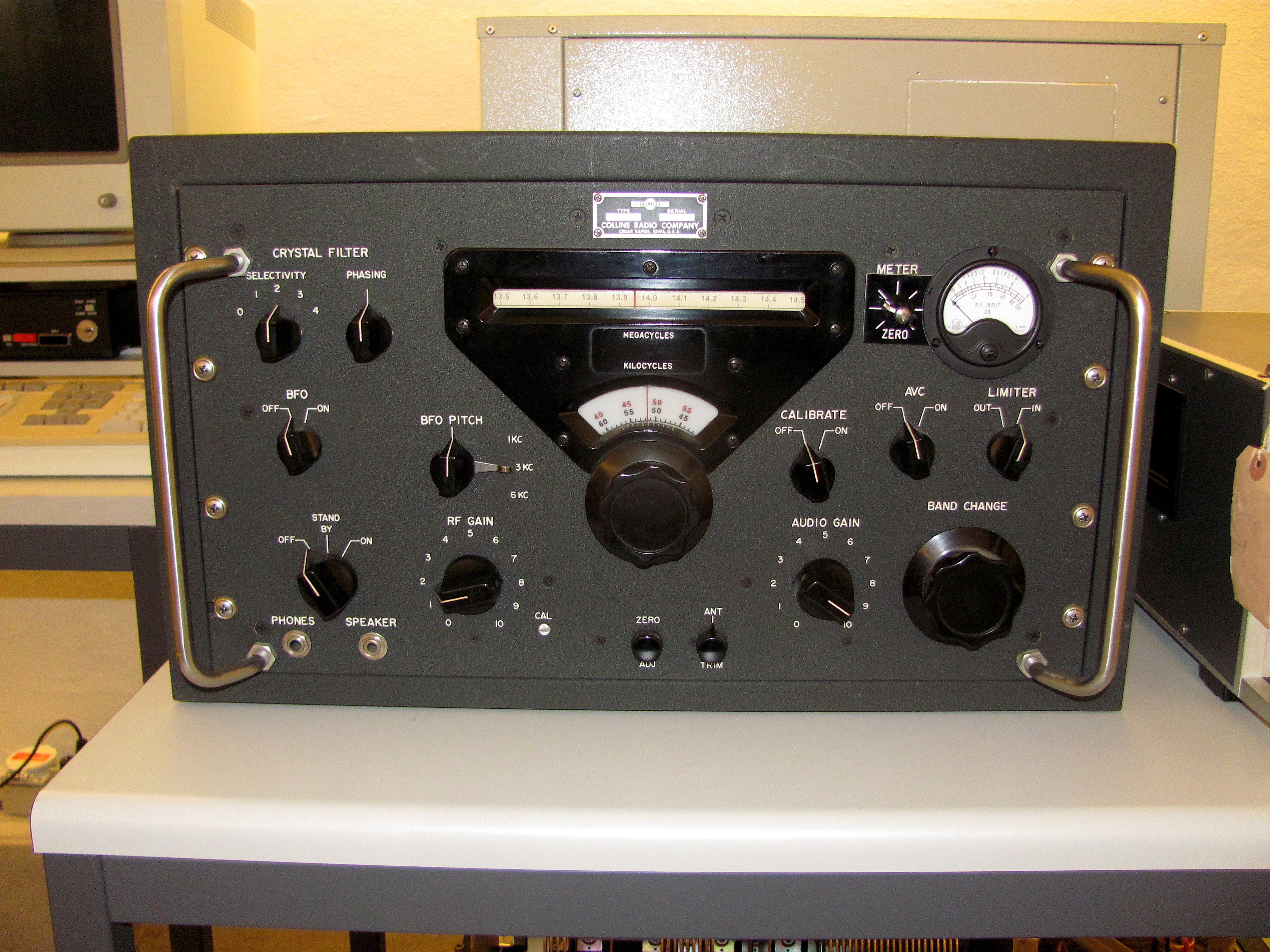 KW-Empfänger Collins 51-J4 Version Schweizer Botschaftsfunk (Andreas Sommer)